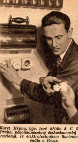 Karel Hejma, český fotbalista